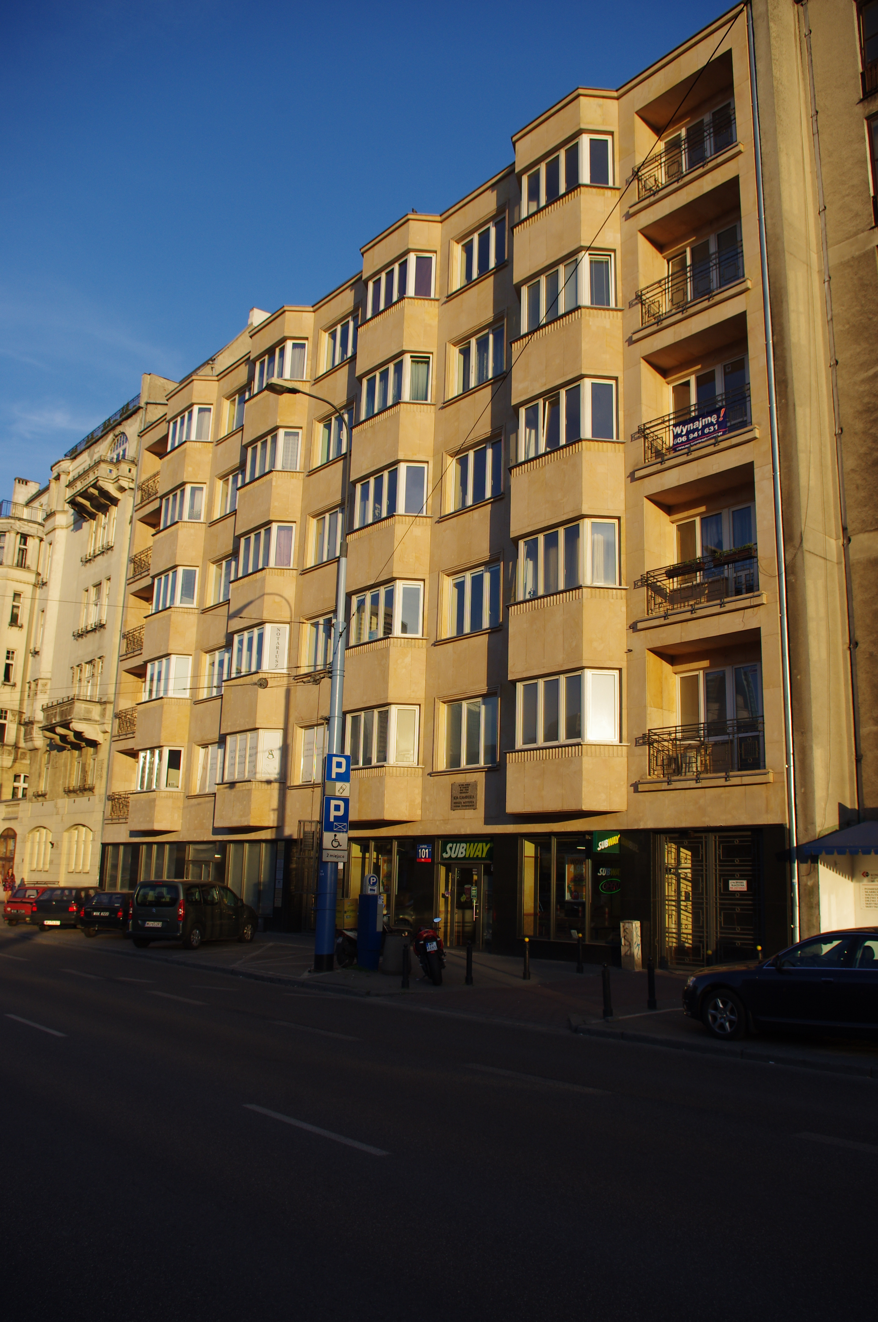 Kamienica w Alejach Jerozolimskich 101 w Warszawie, gdzie w latach 1960-1968 mieszkała aktorka Ida Kamińska